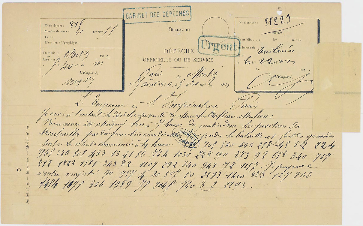 Télégramme, demeuré en partie chiffré, de Napoléon III à l’impératrice Eugénie, expédié à l’issue de la bataille de Froeschwiller, 7 août 1870